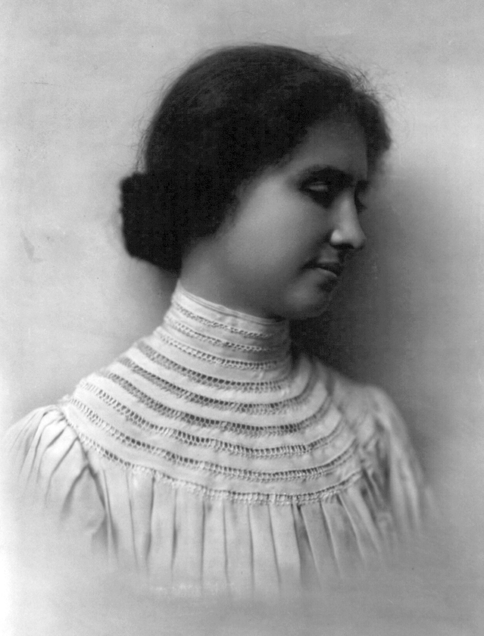 Helen Keller